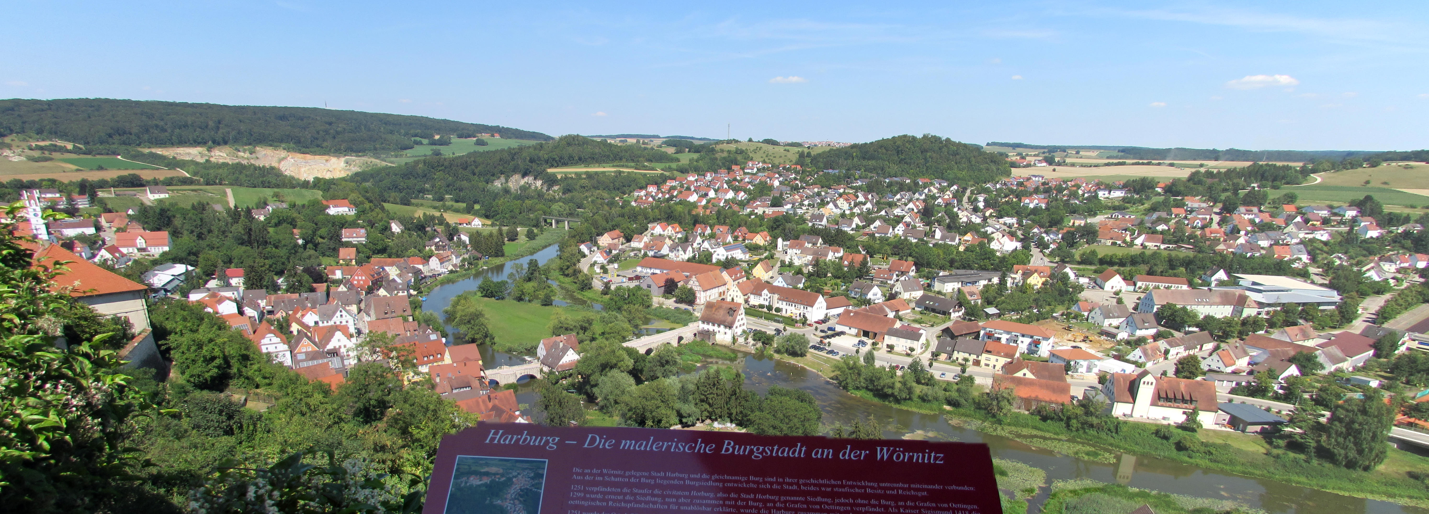 Harburg Wörnitz Panorama